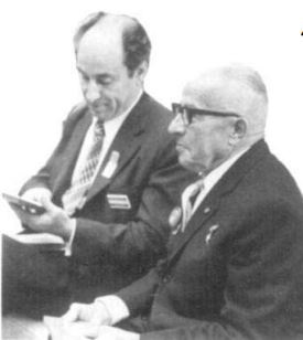 M. Mohamed Mzali en compagnie du général Vladimir Stoytchev à Varna en 1973, lors de l'élection de Mzali à la comission exécutive du CIO.